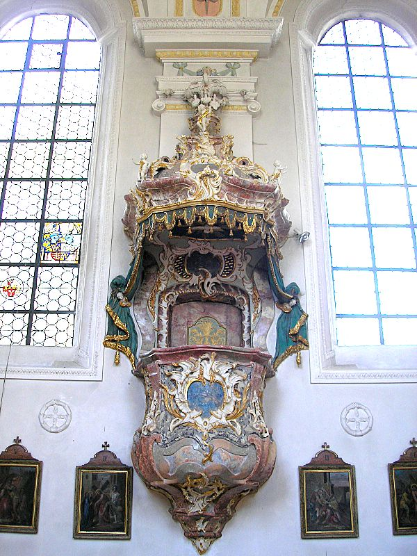 Pfarrkirche St. Wolfgang (Mickhausen, Landkreis Augsburg, Bayerisch-Schwaben). Die Kanzel (1756). Eigene Aufnahme, Mai 2007 / Parish church St. Wolfgang (Mickhausen, Bavaria, Germany). The pulpit (1756). Own photo, May 2007